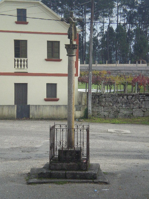 Cruceiro da igrexa de San Martiño, Moreira, Ponteareas, Espanha